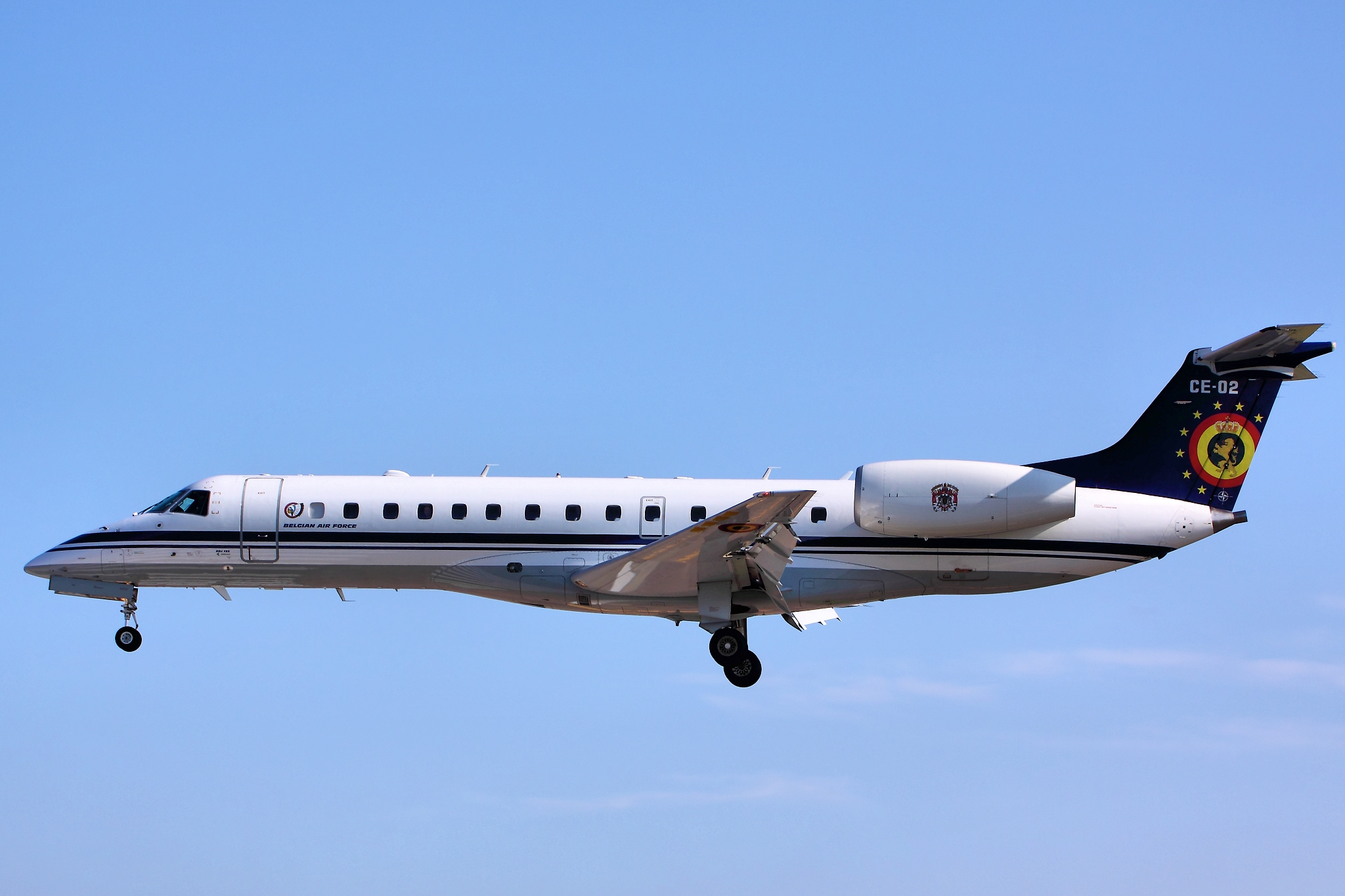 Embraer ERJ-135 - RIAT 2011